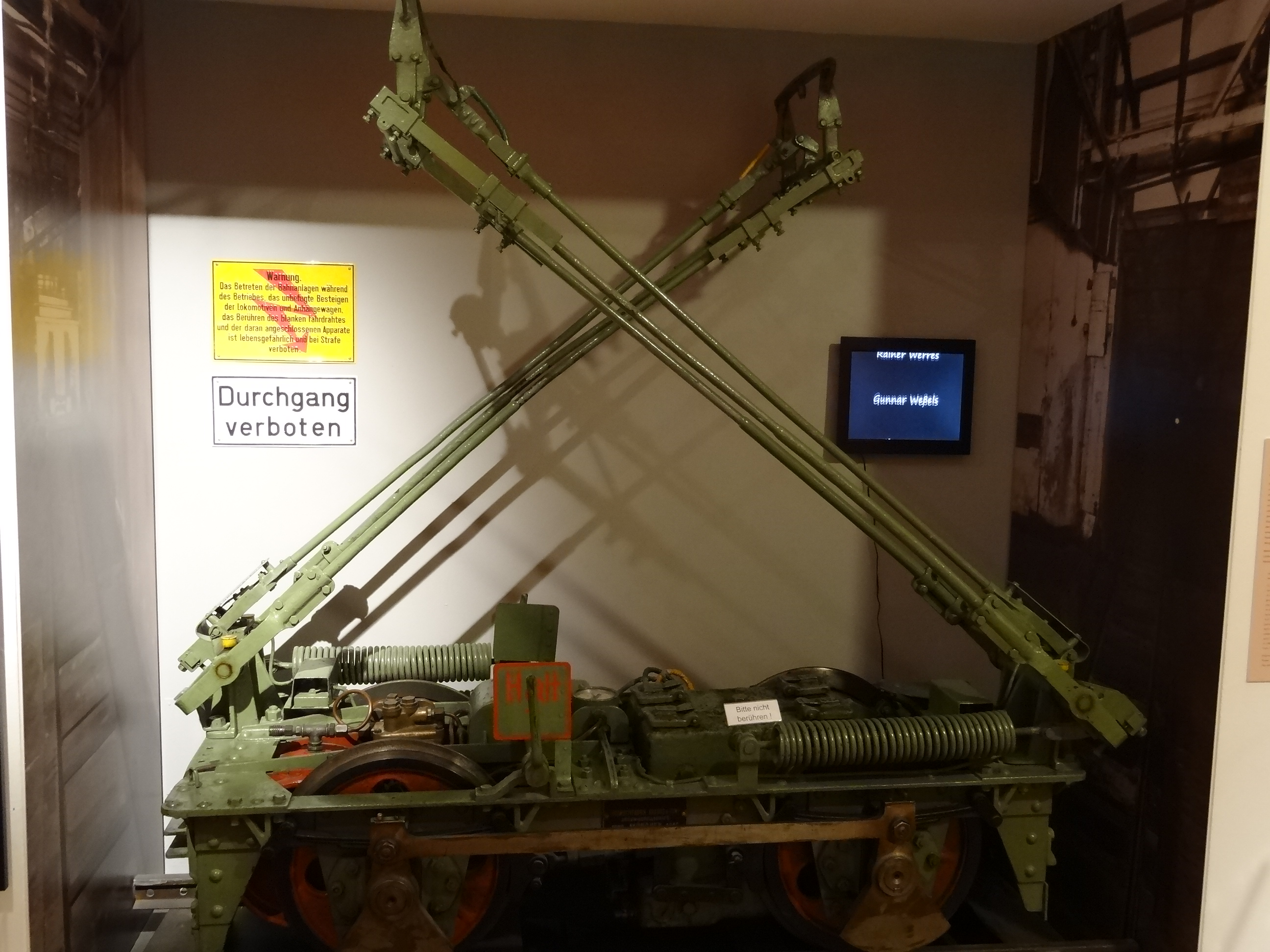 Krauss & Co. (mechanischer Teil) und Siemens-Schuckertwerke (elektrischer Teil), München 1910. Motor: 155-Volt-Drehstrommotor, Leistung: 3PS, Höchstgeschwindigkeit: 10 km/h. "Sie fuhr auf einer Strecke von 400 Metern und war einzigartig in Deutschland: die unbemannte Post-U-Bahn. Von 1910 bis 1988 verband sie den Münchner Hauptbahnhof mit dem Postamt an der Hopfenstraße. Eine Lokomotive berförderte vier mit Briefsendungen gefüllte Wagen. Bis zu zehn Züge pro Stunde fuhren durch den Tunnel. 1966 wurden die Loks und die Wagen noch einmal erneuert. Erst mit der Schließung des alten Postamts 1988 wurde diese U-Bahn-Verbindung eingestellt." Museum für Kommunikation Nürnberg